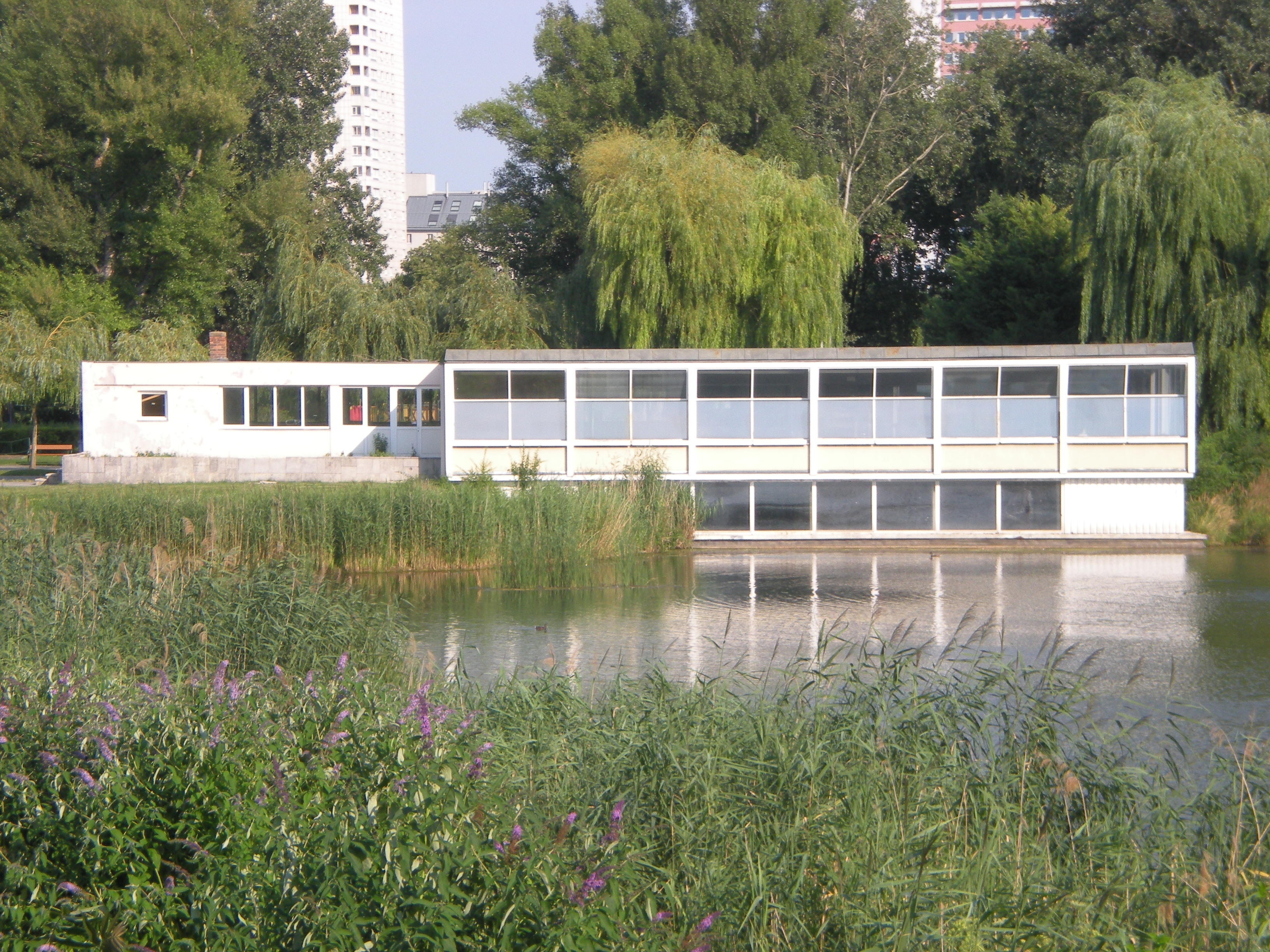 Ehemaliges Seerestaurant am Irissee im Donaupark, Wien